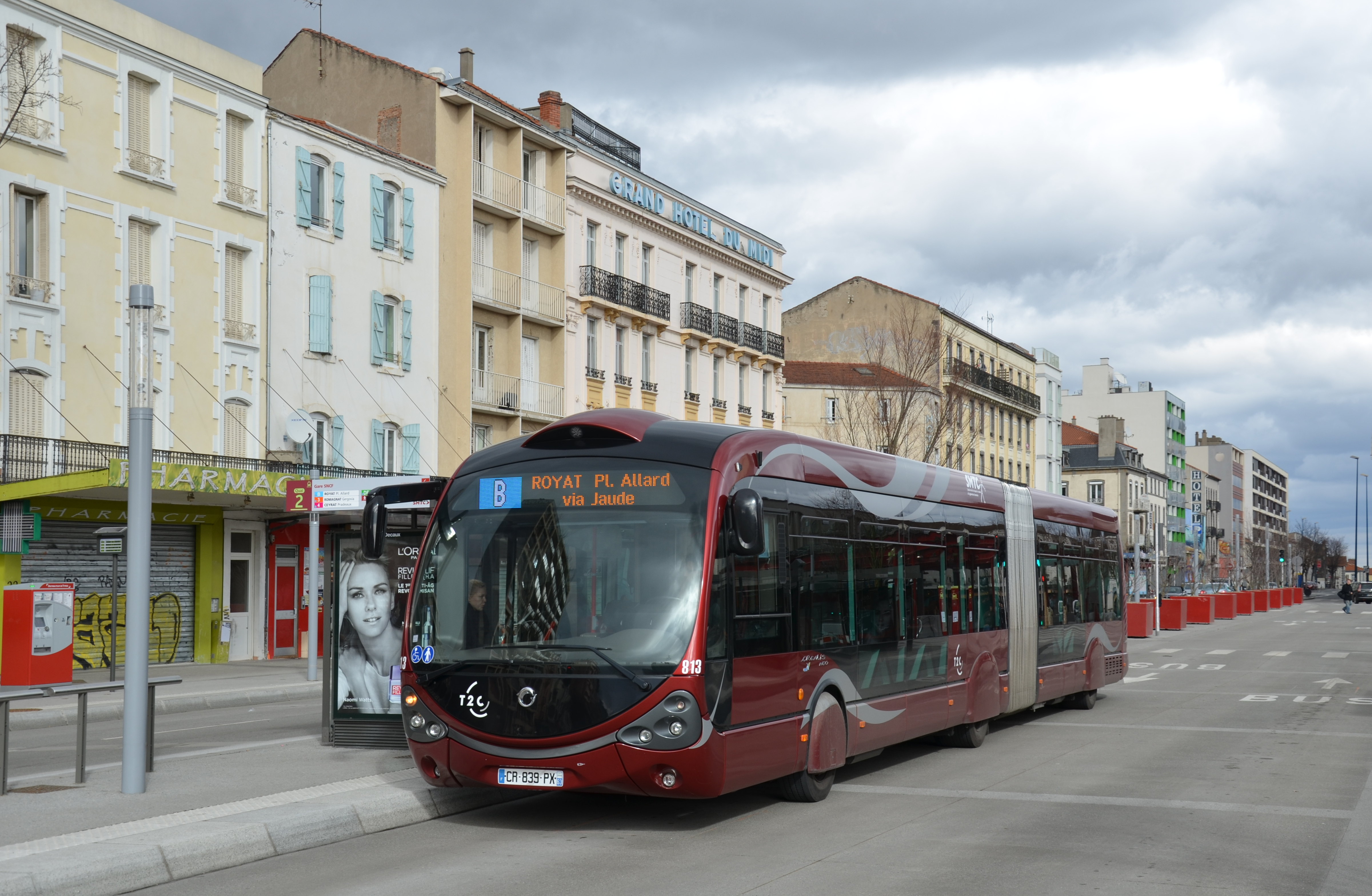 Irisbus Crealis Neo 18 n°813 de la ligne B du réseau T2C de Clermont-Ferrand, au nouveau pôle d'échanges de la gare SNCF.